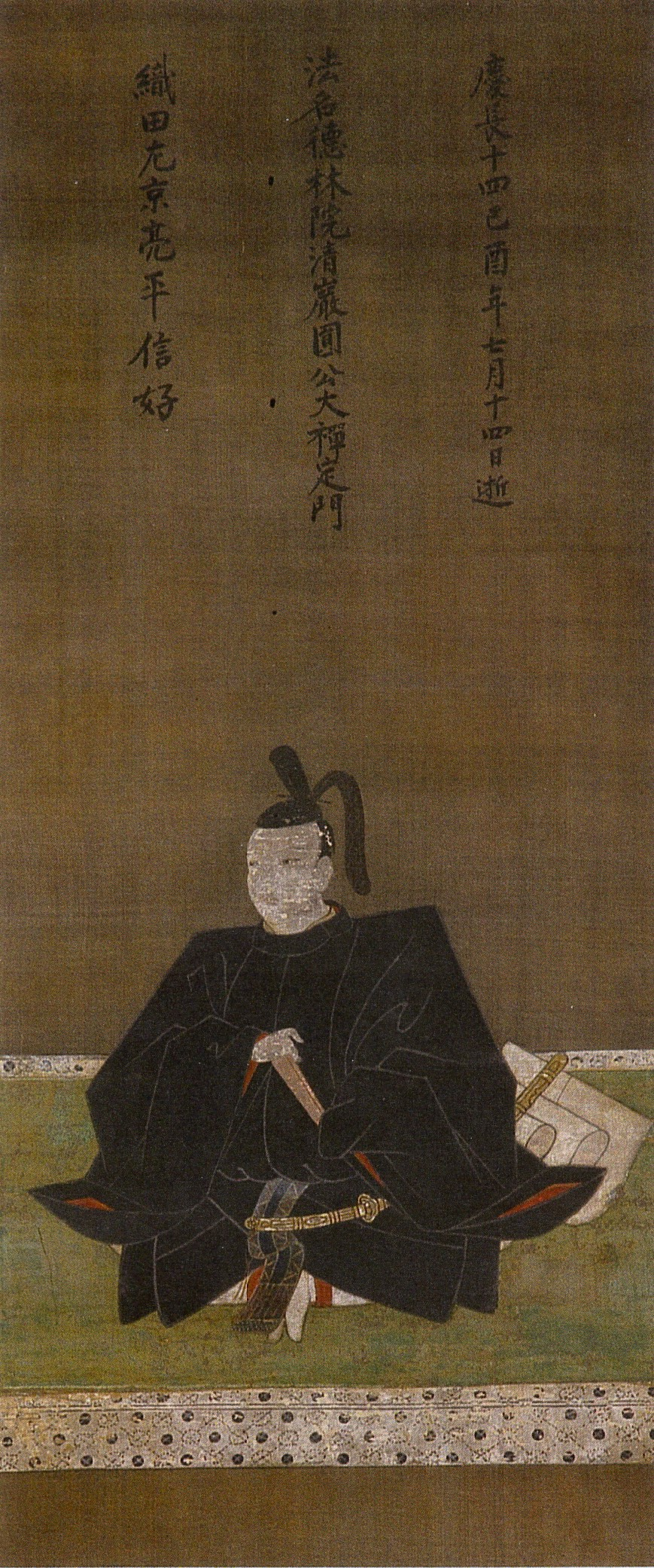 織田信長の十男・織田信好の肖像画。